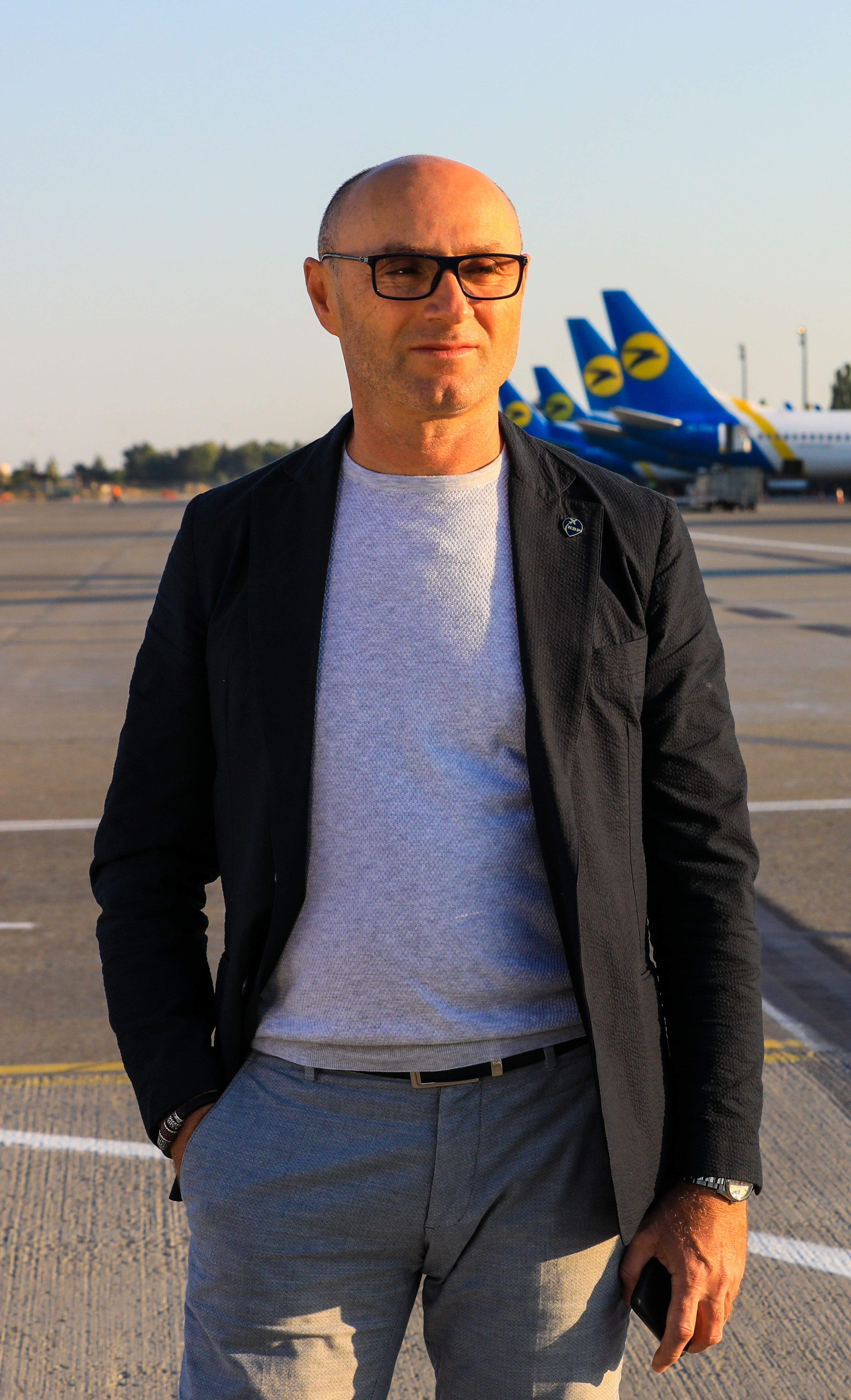 Євгеній Дихне